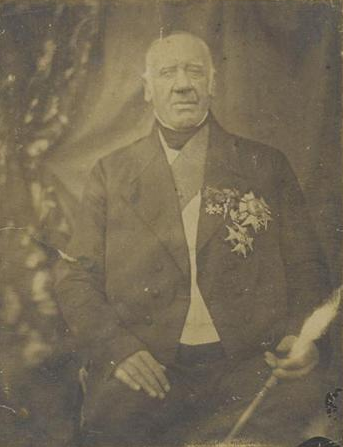 Le général Henri Rottembourg (1769-1857) en 1855.